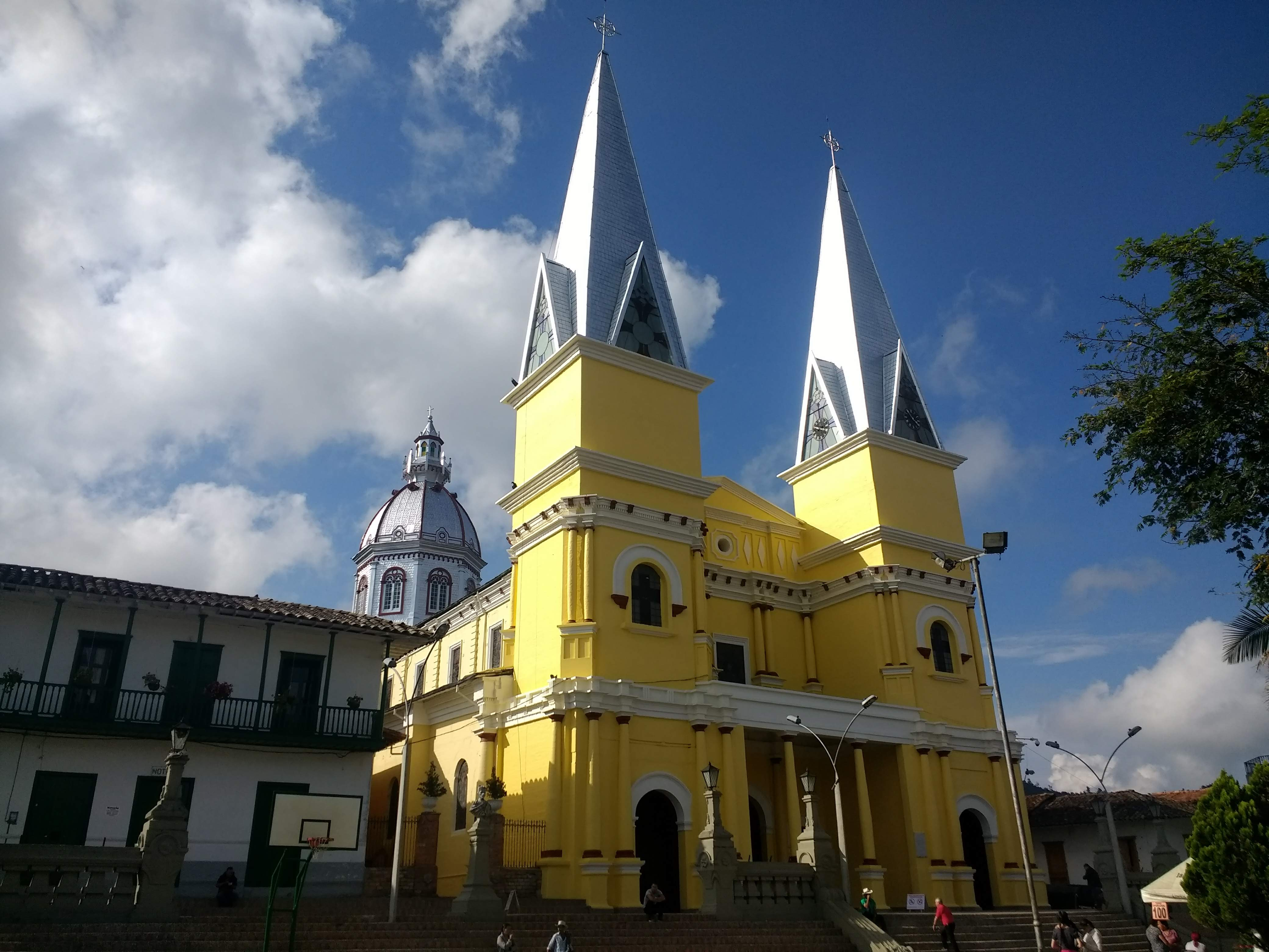 Iglesia de Santo Domingo (Santo Domingo, Antioquia)